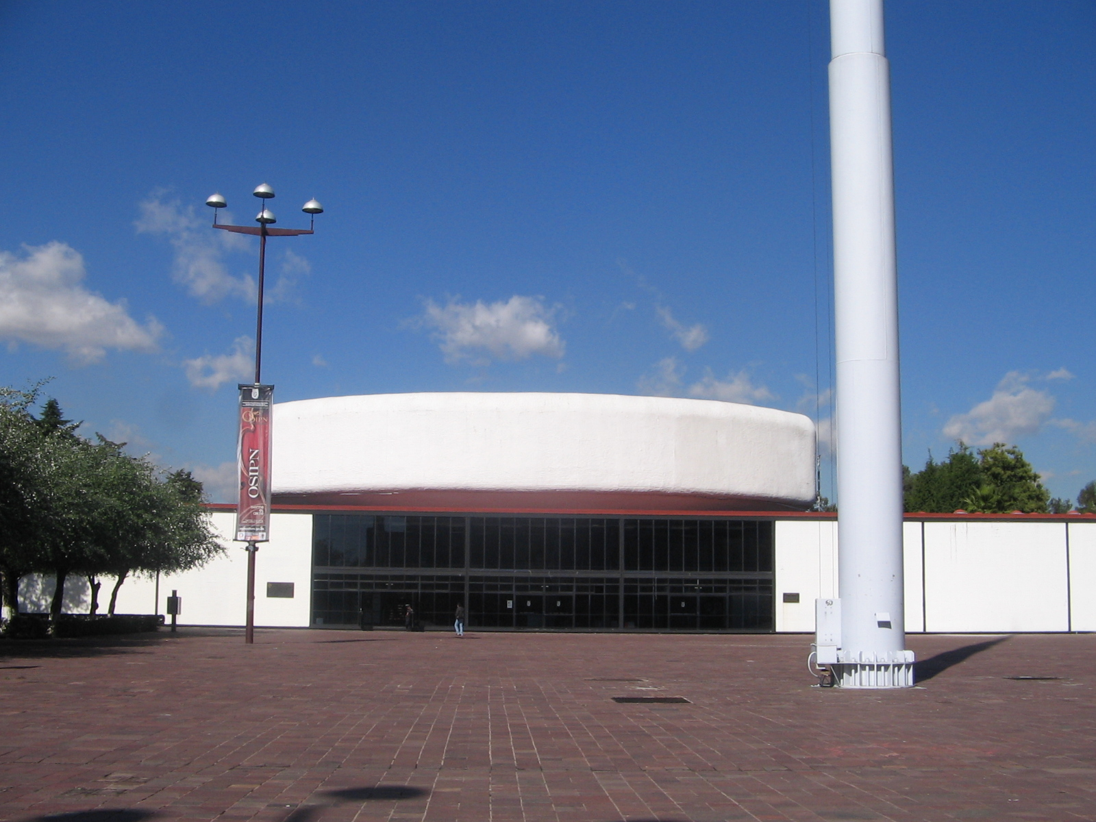 Centro Cultural Jaime Torres Bodet (el queso), en la Unidad Profesional "Adolfo López Mateos" del IPN.